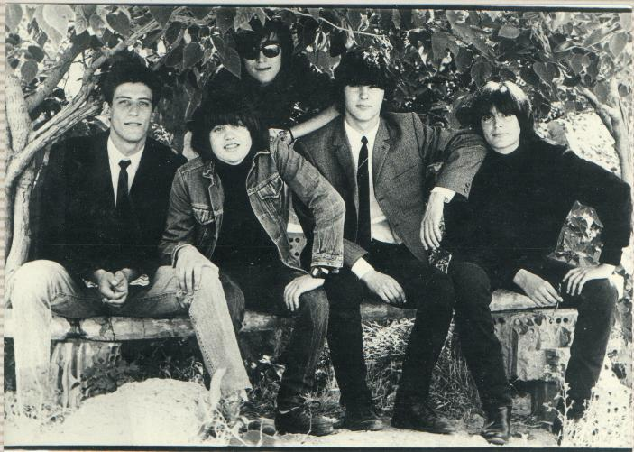 The Furtivos en 1986